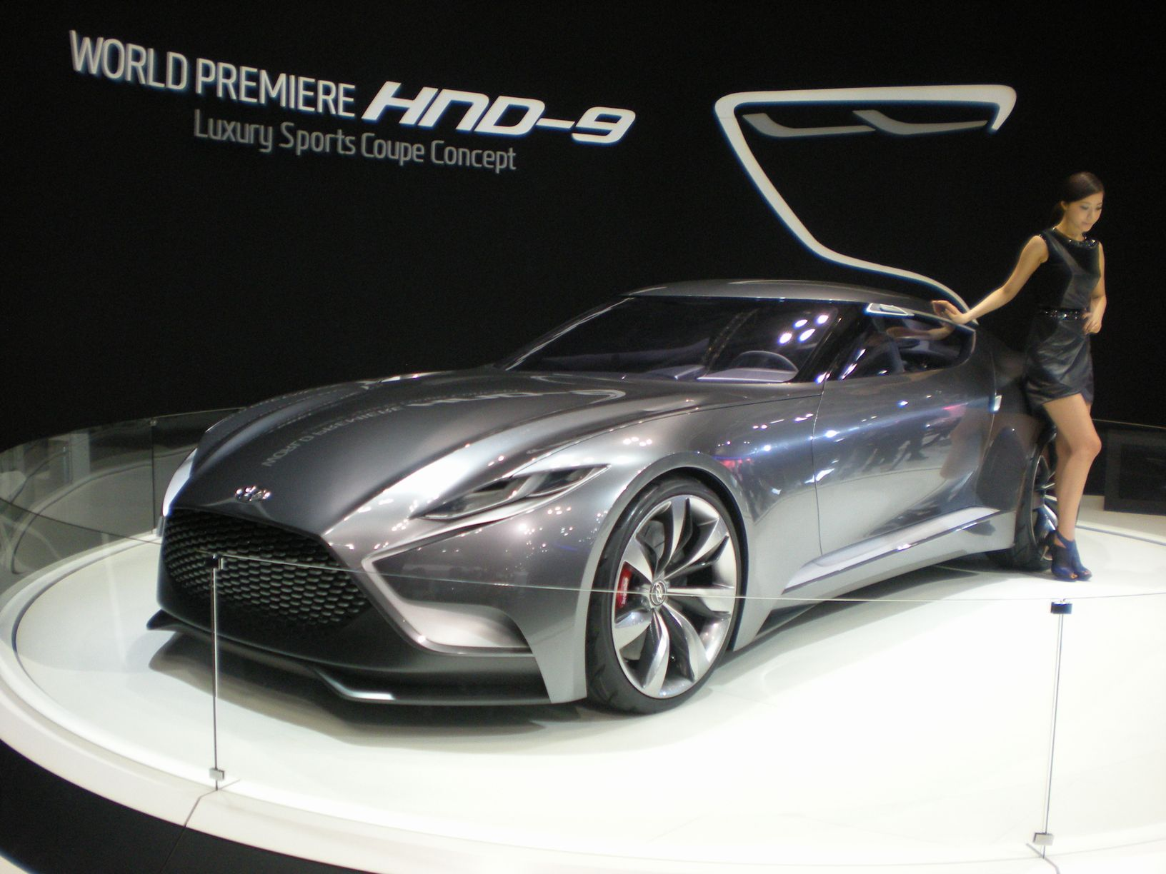 ヒュンダイ・HND-9